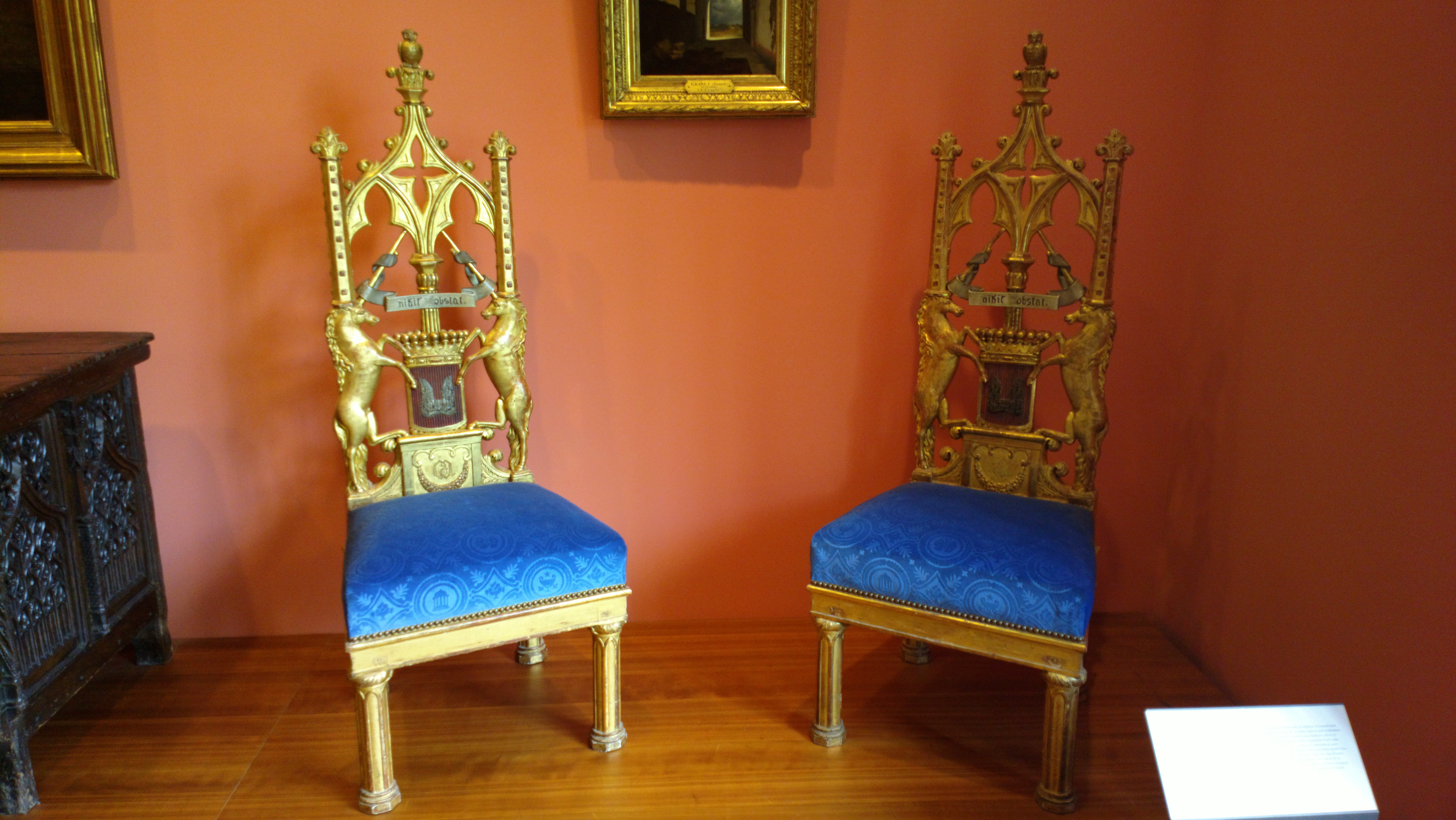 François-Honoré-Georges Jacob dit Jacob-Desmalter (1770-1841) Chaise du cabinet gothique d'Aimée Carvillon des Tillières (1797 - 1853) épouse de Rainulphe d'Osmond (1788 - 1862.), par mariage, la comtesse d'Osmond. Vers 1817-1820 : Bois doré et sculpté, garniture moderne.